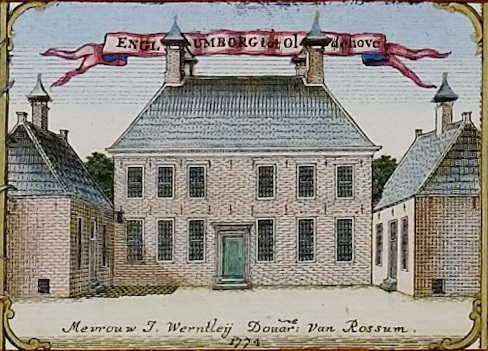 Englumborg in Oldehove. Uitsnede uit de kaart van Theodorus Beckeringh uit 1781